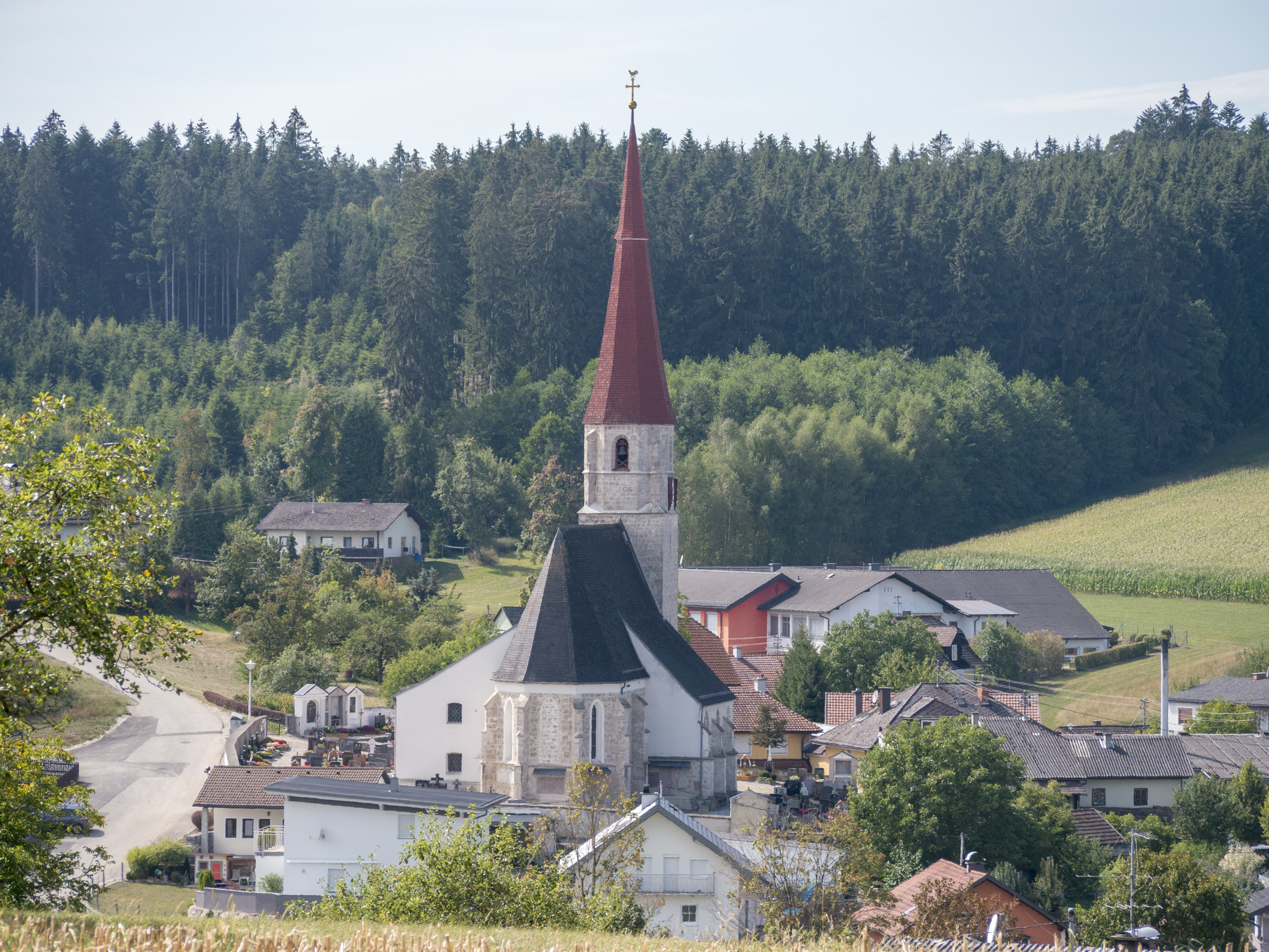 Kath. Pfarrkirche hl. Jakob der Ältere und Friedhof